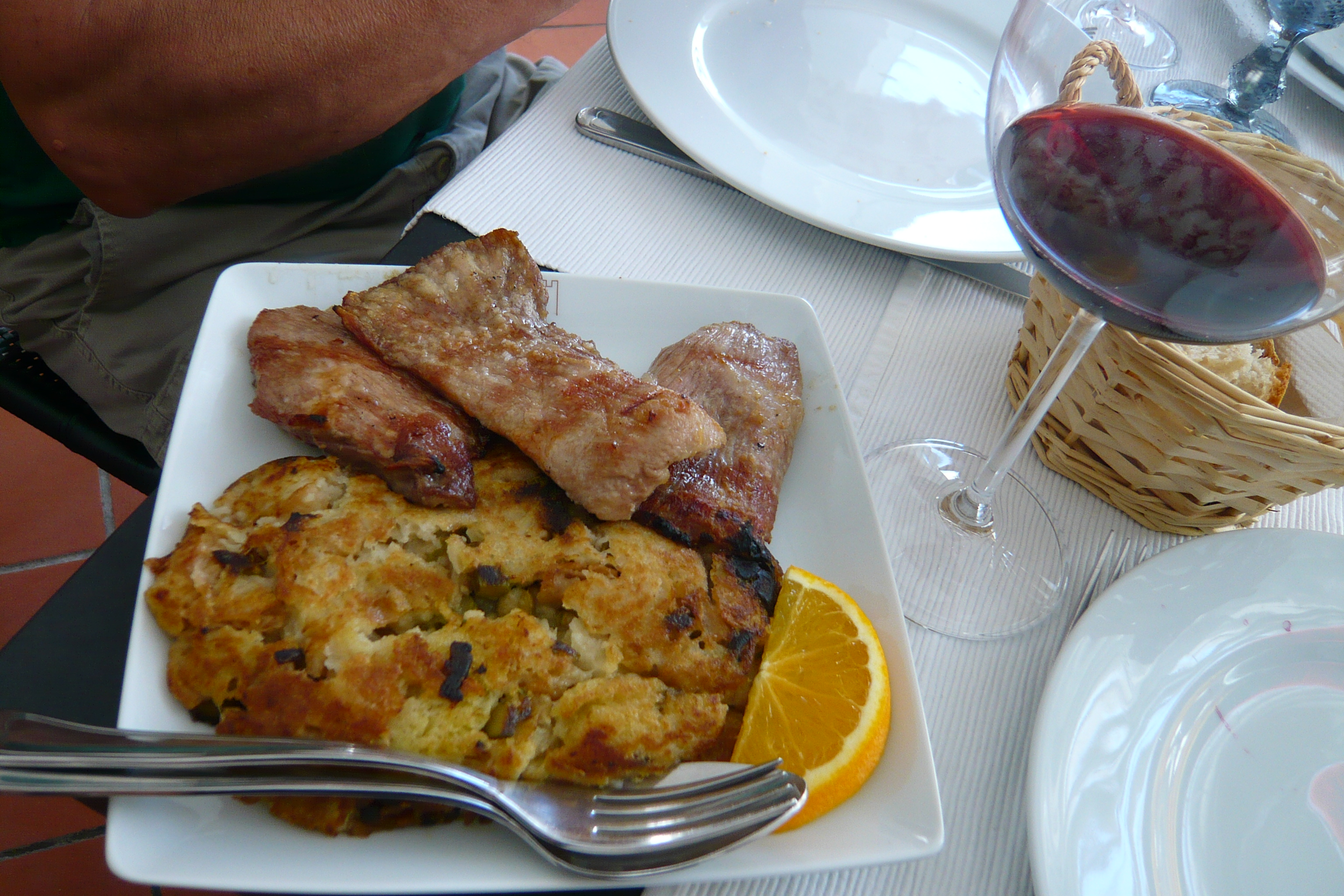 at Patio da Oliveira, Mourao